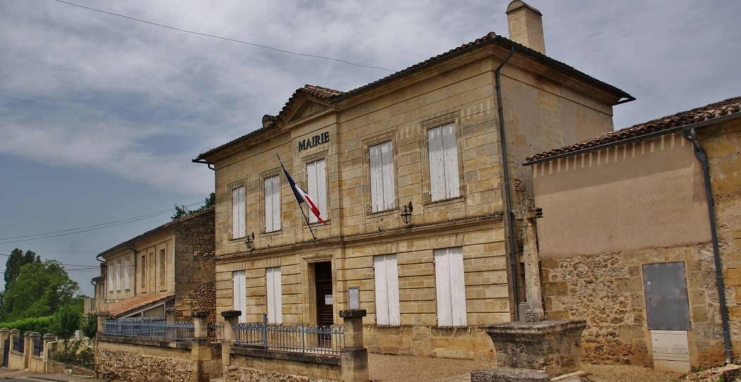 La Mairie